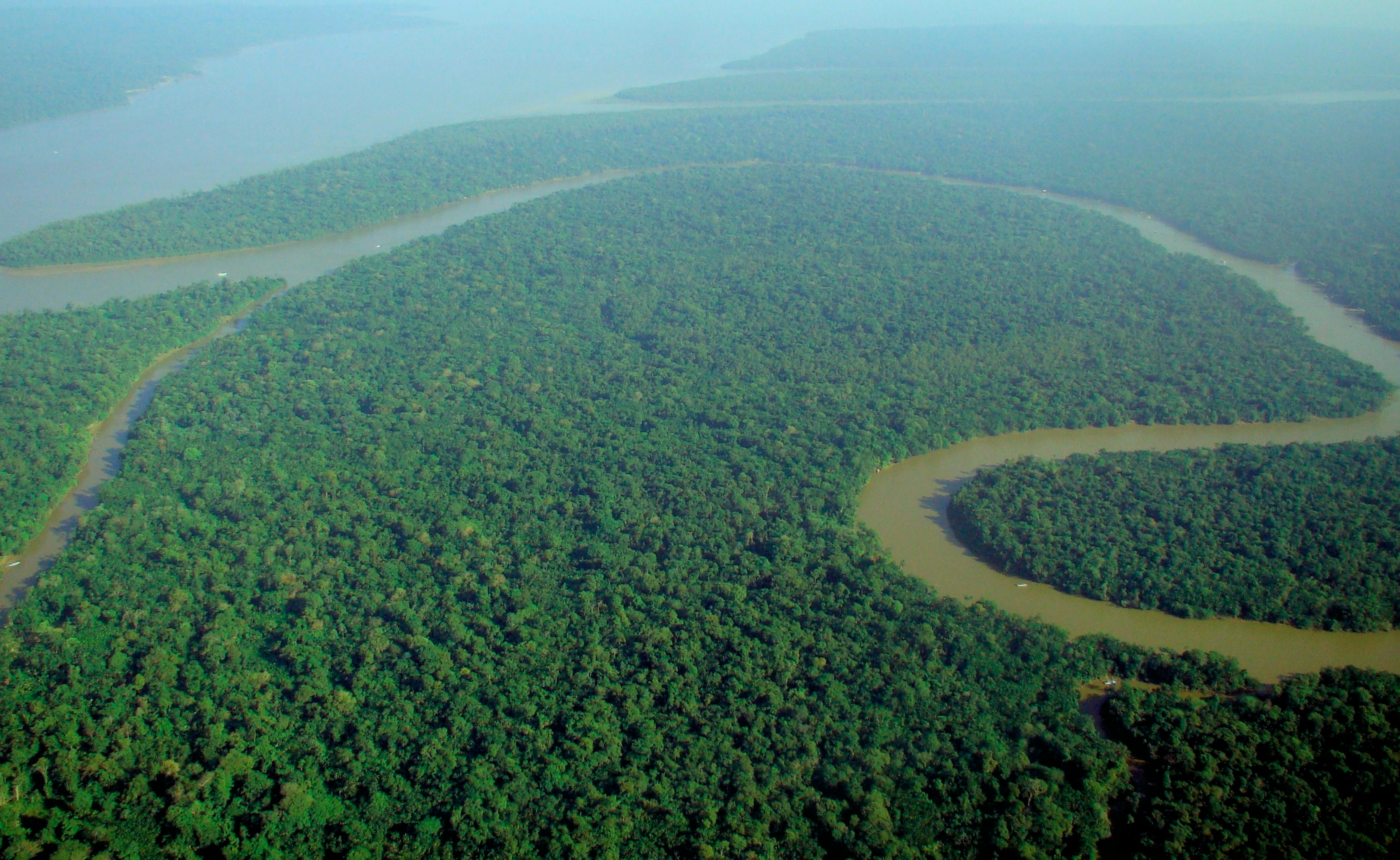 Visão do Alto, da janela do avião, o Rio Solimões, parecendo uma cobra grande, como é chamado pelos indígenas. Rio Solimóes - Amazonia - Floresta Amazonica - Brasil. Follow us in